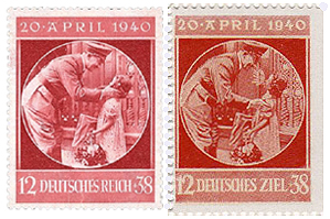 Почтовая марка Германии ко дню рождения Гитлера, 1940 год. Американская марка-пародия, 1943 год.